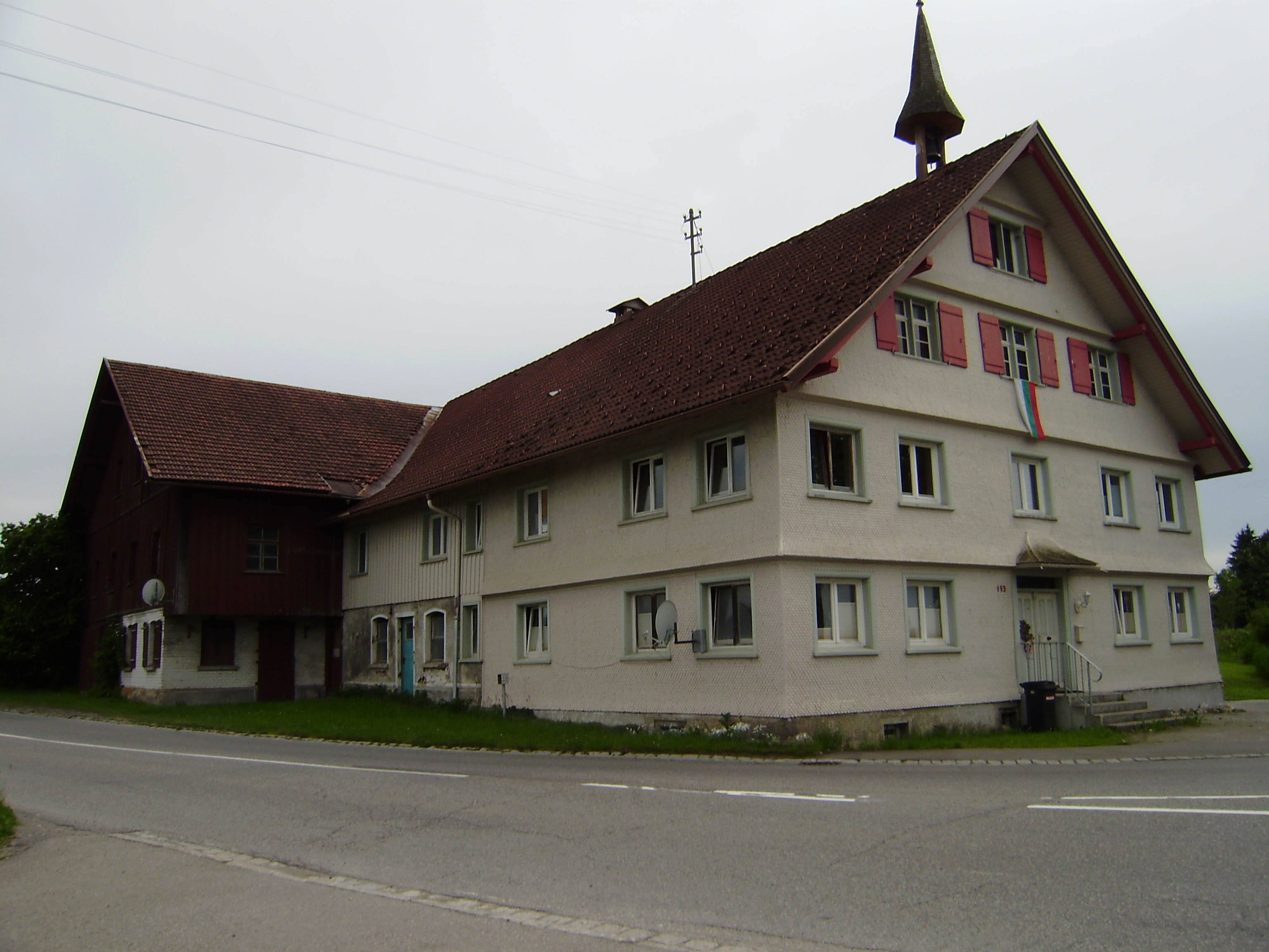 Bauernhaus, Steinegaden 143, Röthenbach i Allgäu v N